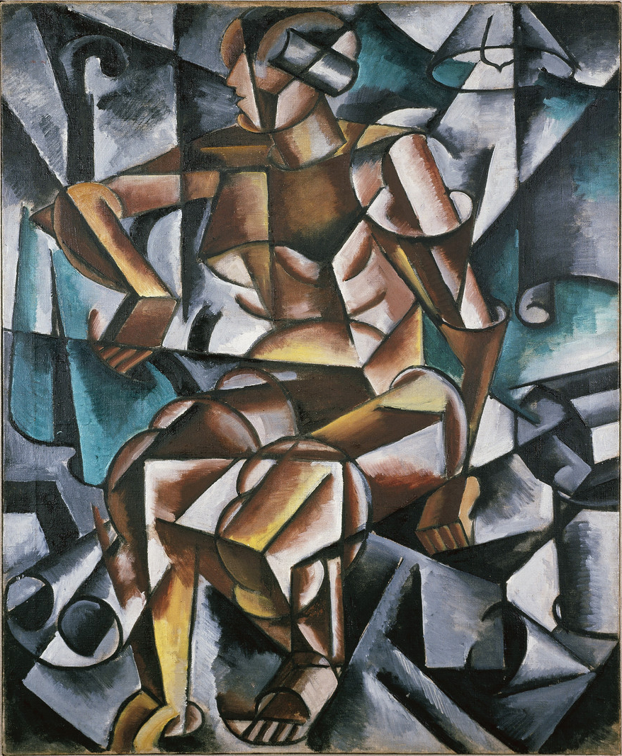 Ljubow Sergejewna Popowa (1889-1924): Sitzender weiblicher Akt, 106 x 87 cm., 1913/1914, Museum Ludwig, Köln